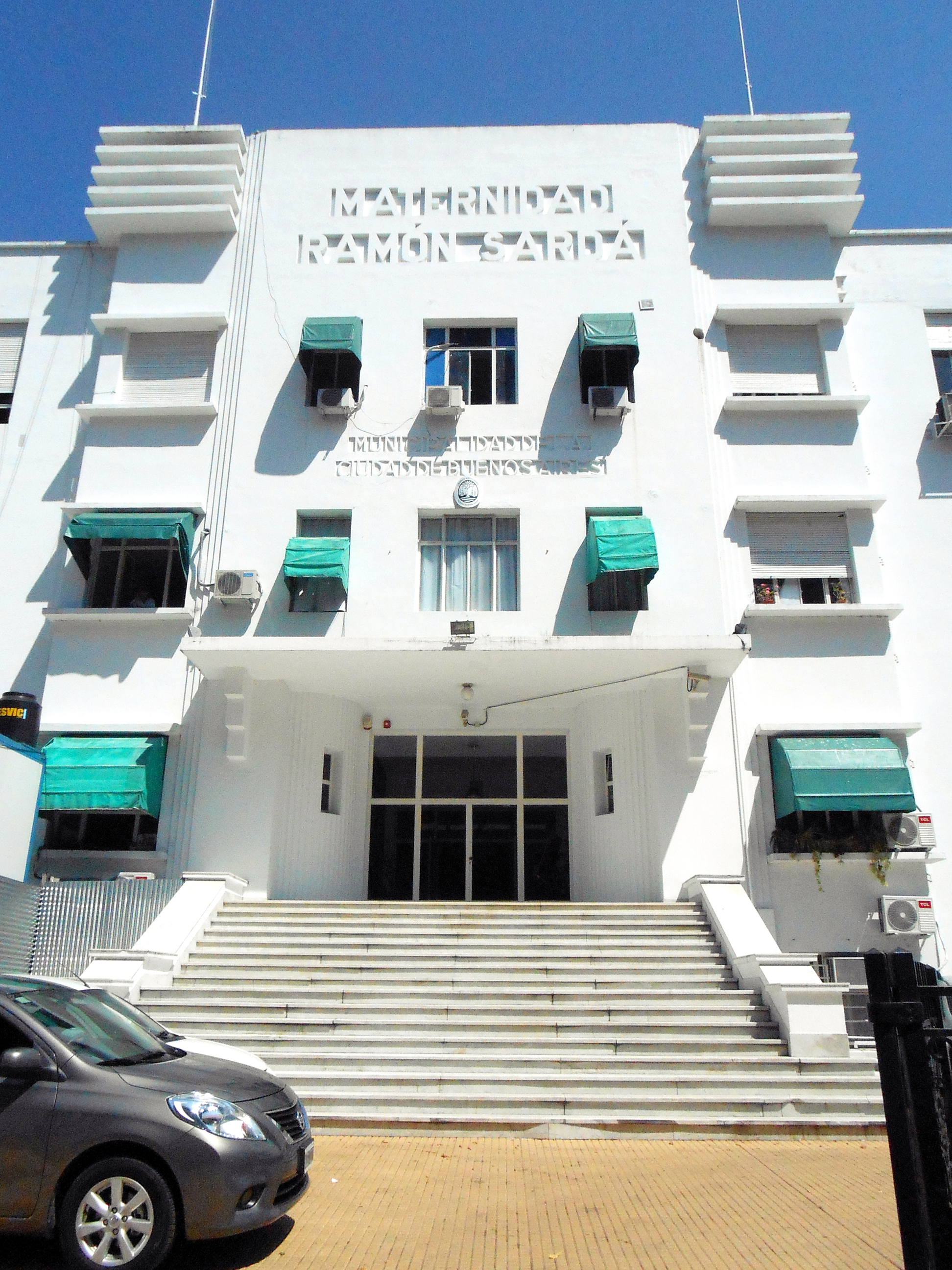 Entrada Maternidad Ramon Sarda - Parque Patricios, Buenos Aires, Argentina.